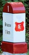 Borna la km 1 de pe drumul naţional turistic DN1E Livada Poştei-Poiana Braşov